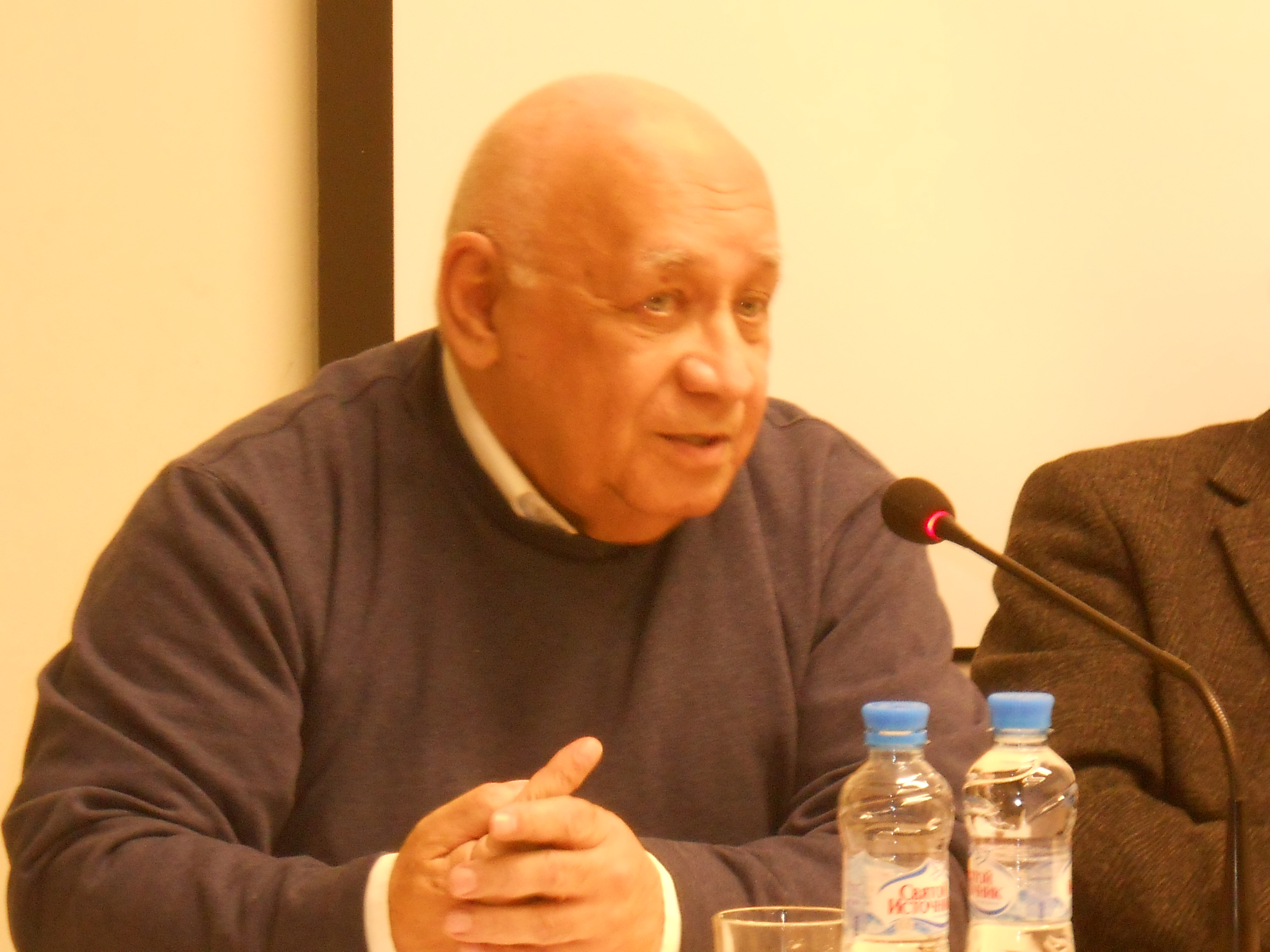 Ненароков Альберт Павлович, 2013 г.